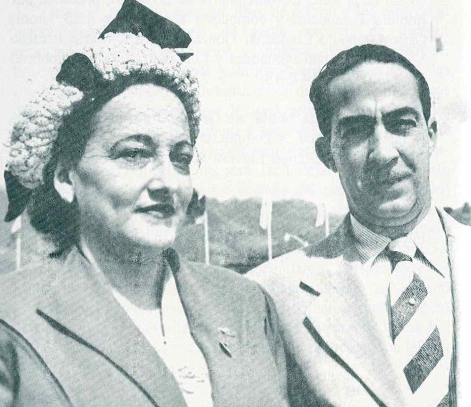 Rosario Pérez Carreño y su esposo Germán Suárez Flamerich.